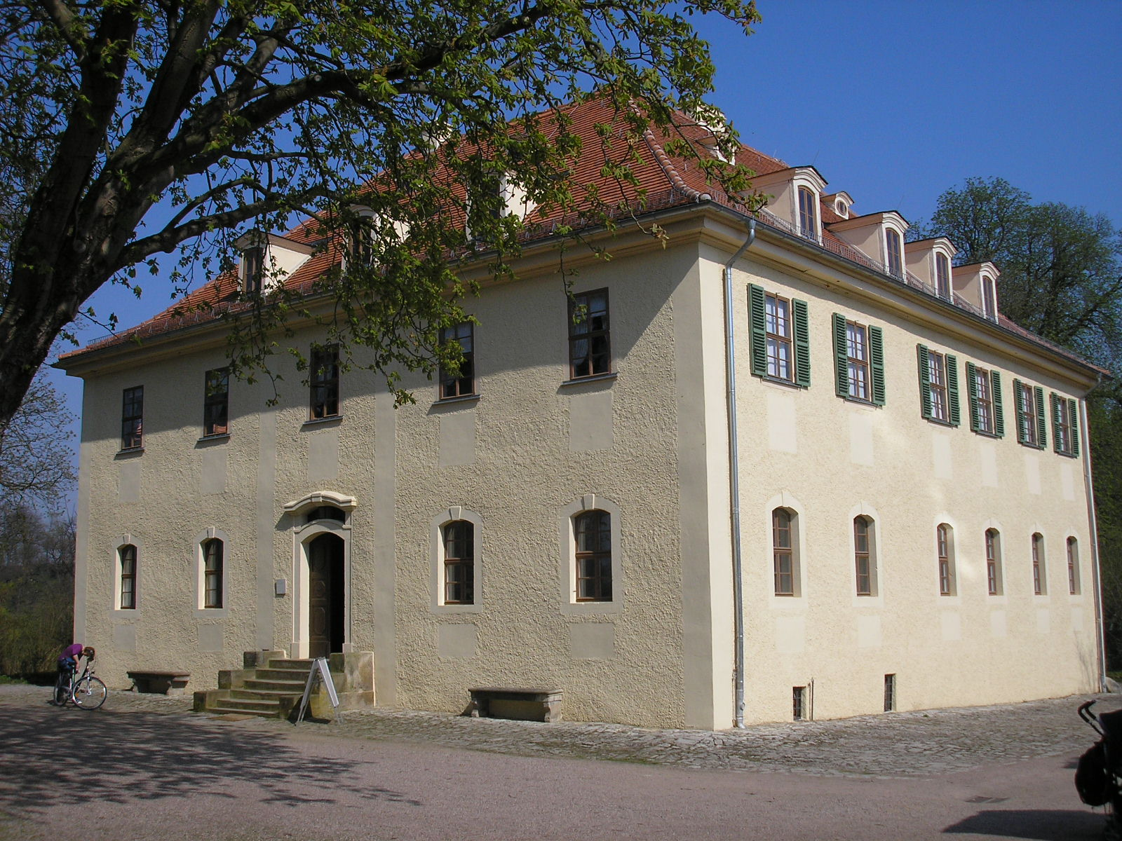 Das Schloss Tiefurt bei Weimar (Thüringen).